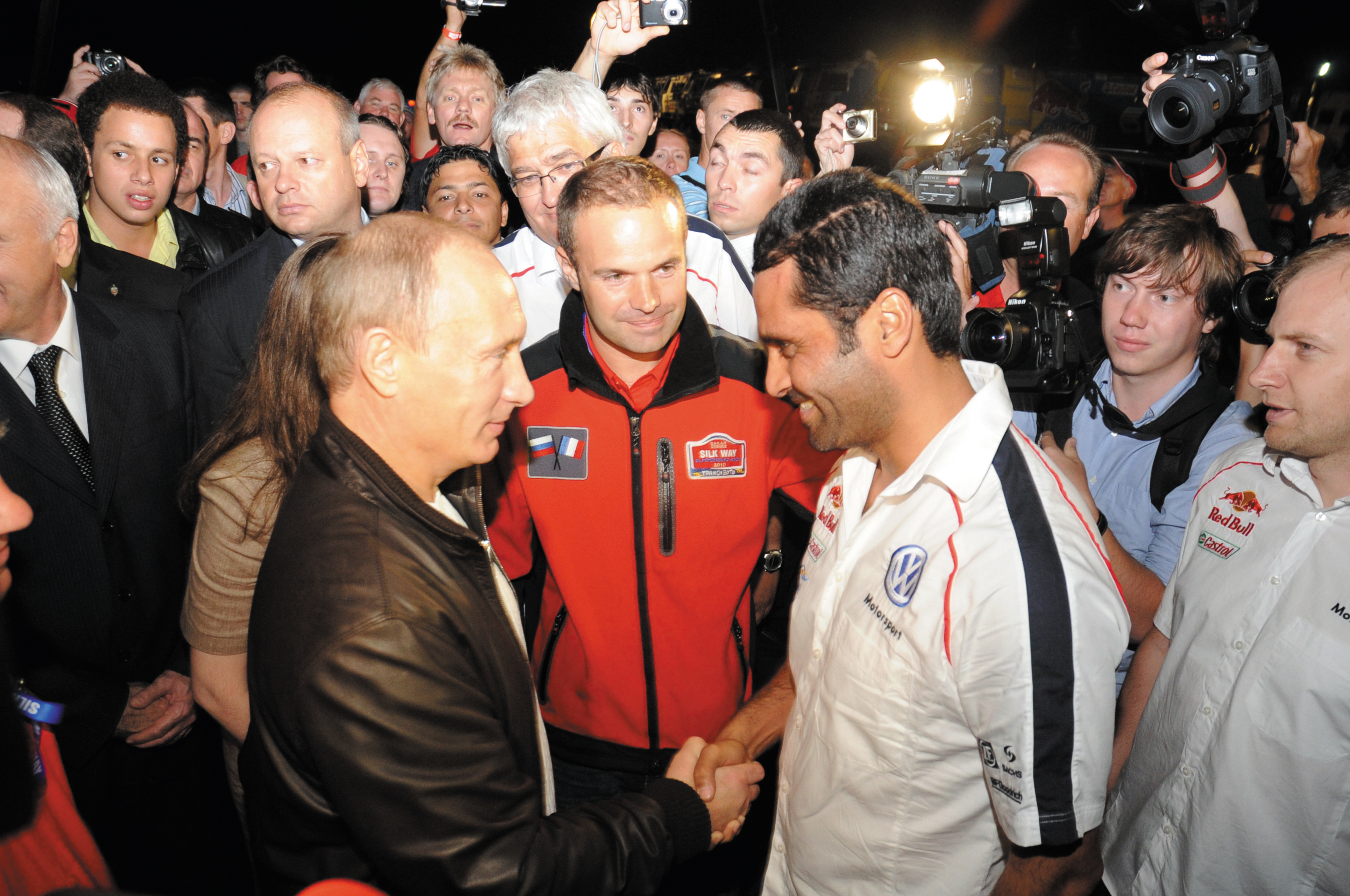 Владимир Путин на бивуаке "Шелковый путь" встречается с участниками марафона